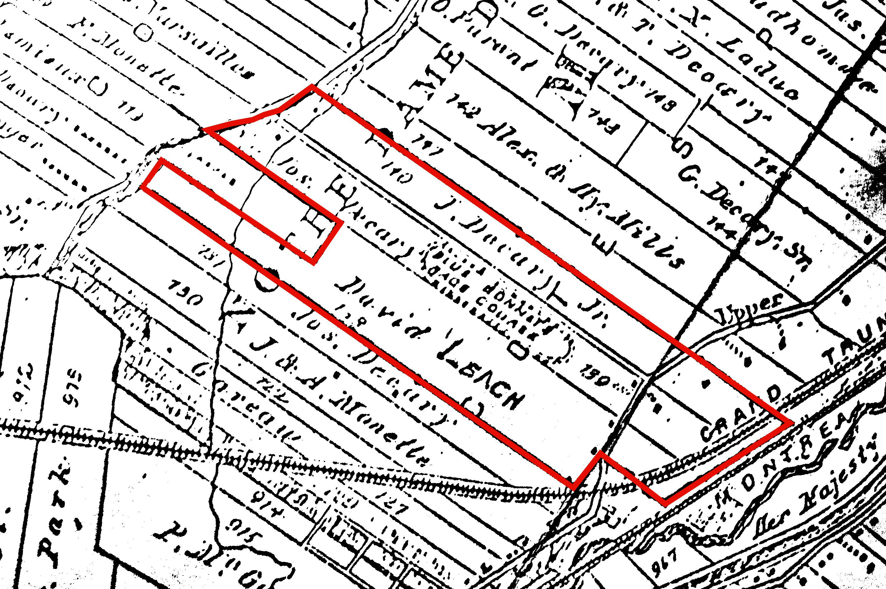 Terres qui constirons Montréal-Ouest